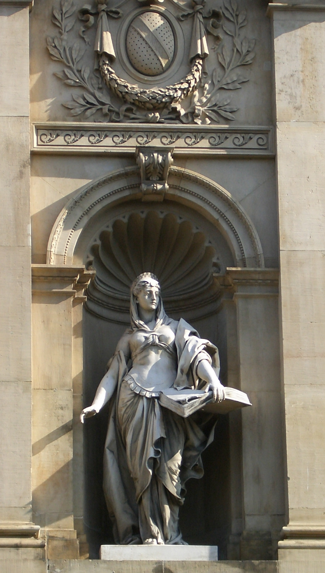 Landgericht Karlsruhe, allegorische Figur am Westflügel